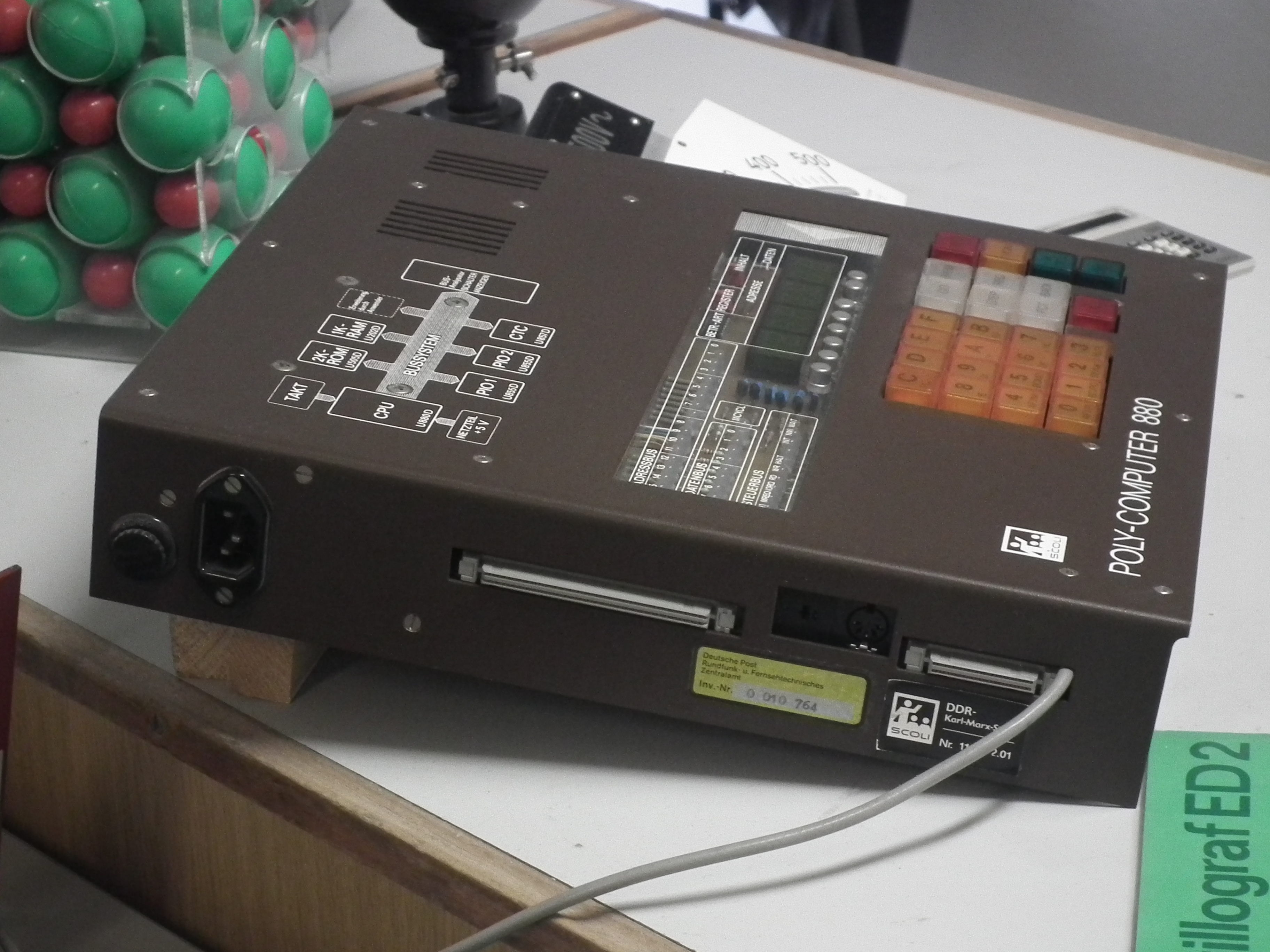 DDR-Museum Zeitreise in Radebeul, POLY-Computer 880, Seitenansicht, Fotografiert mit Genehmigung der Museumsleitung